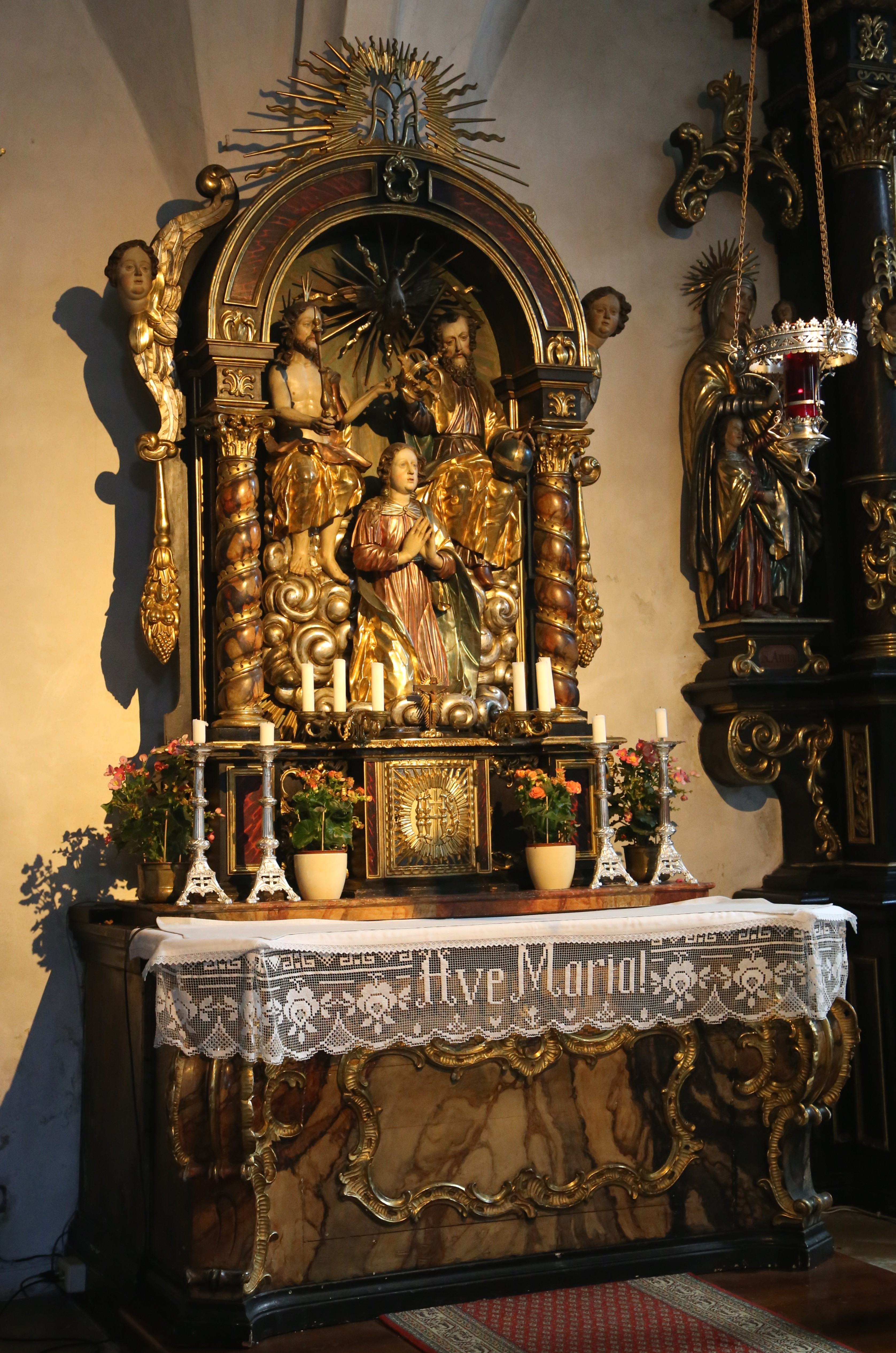 Stadtplatz 37, Aichach; Katholische Spitalkirche Heiliger Geist, zweischiffige Hallenkirche, Fassade mit Volutengiebel und reich gegliedertem Turm, im 15. Jahrhundert, 1642/43 wiederhergestellt, Turm 1734 und 1789; mit Ausstattung; Torbogen